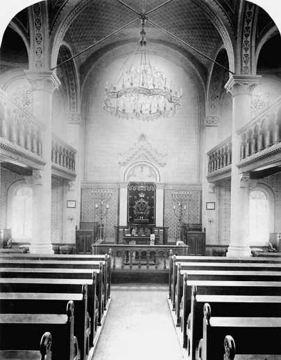 Synagogue of Göppingen - Inside